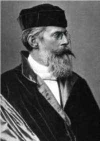 Austrian composer Heinrich von Herzogenberg (1843-1900)